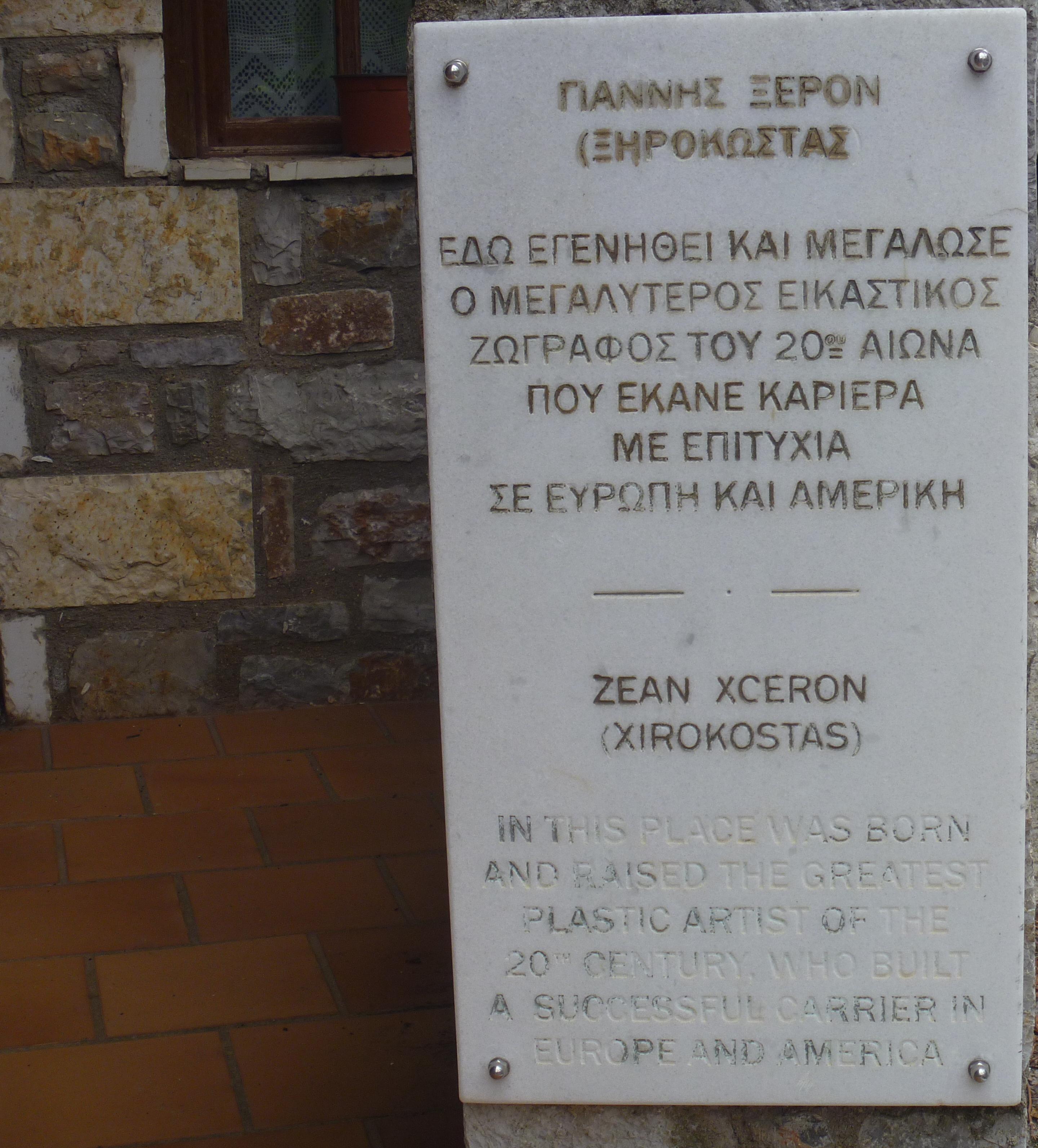 Αναμνηστική πινακίδα στην είσοδο του σπιτιού του Γιάννη Ξηρόκωστα στον Ίσαρη Αρκαδίας